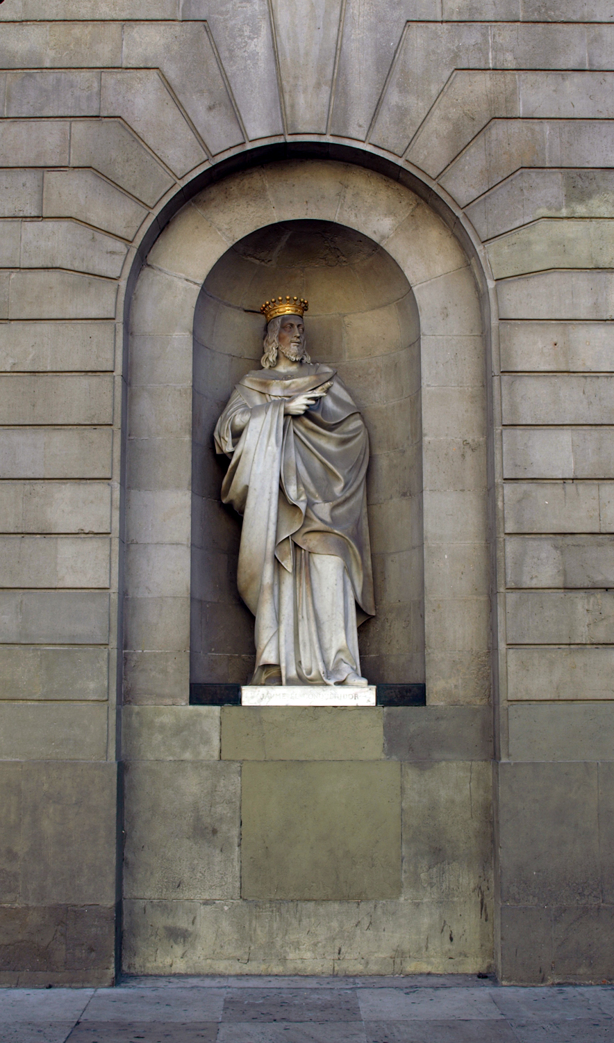 Ajuntament de Barcelona - Escultura de Jaume I a la façana neoclàssica (Josep Bover i Mas).